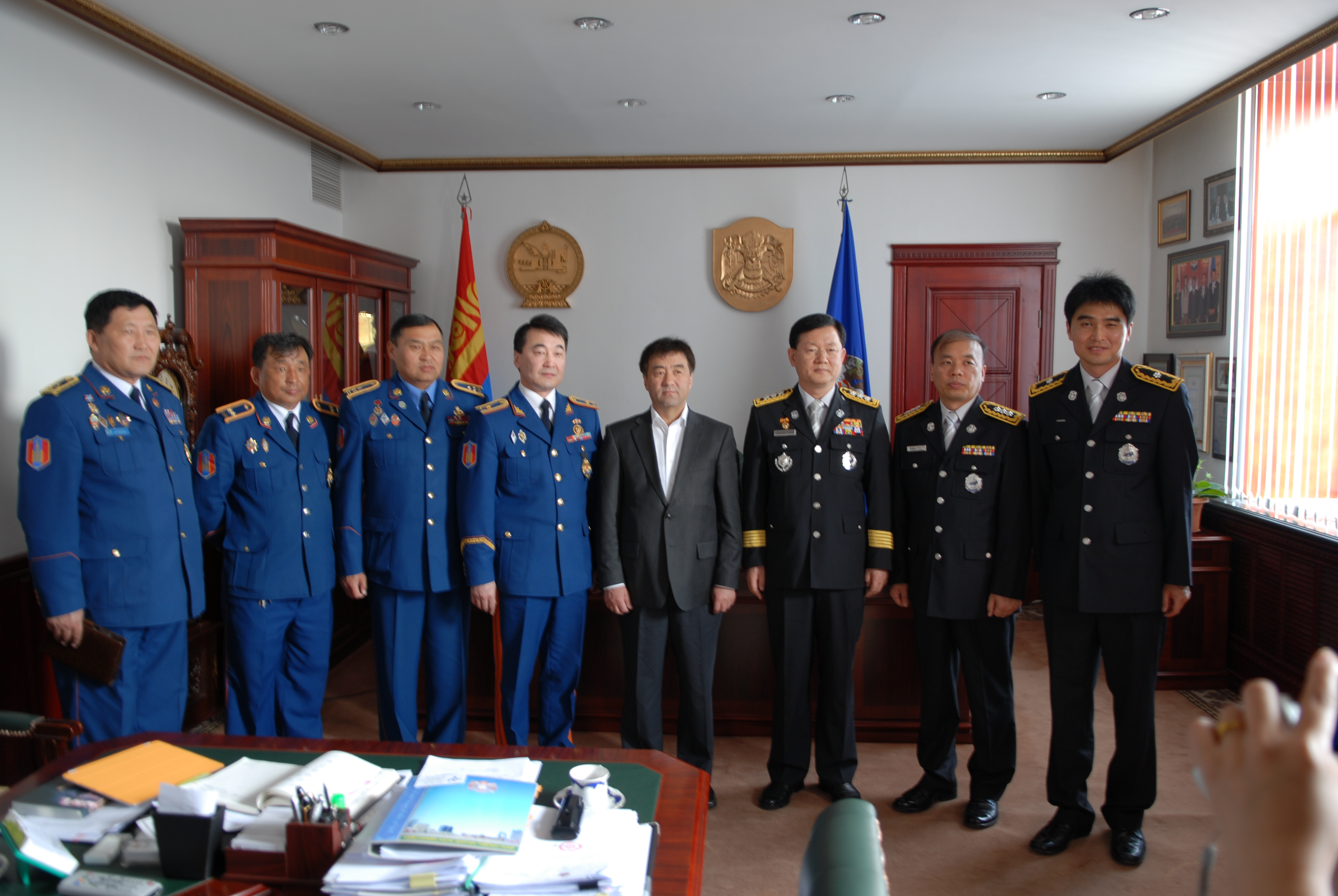 서울특별시 소방재난본부 소장 사진. Photos of Seoul Metropolitan Fire and Disaster Headquarters.